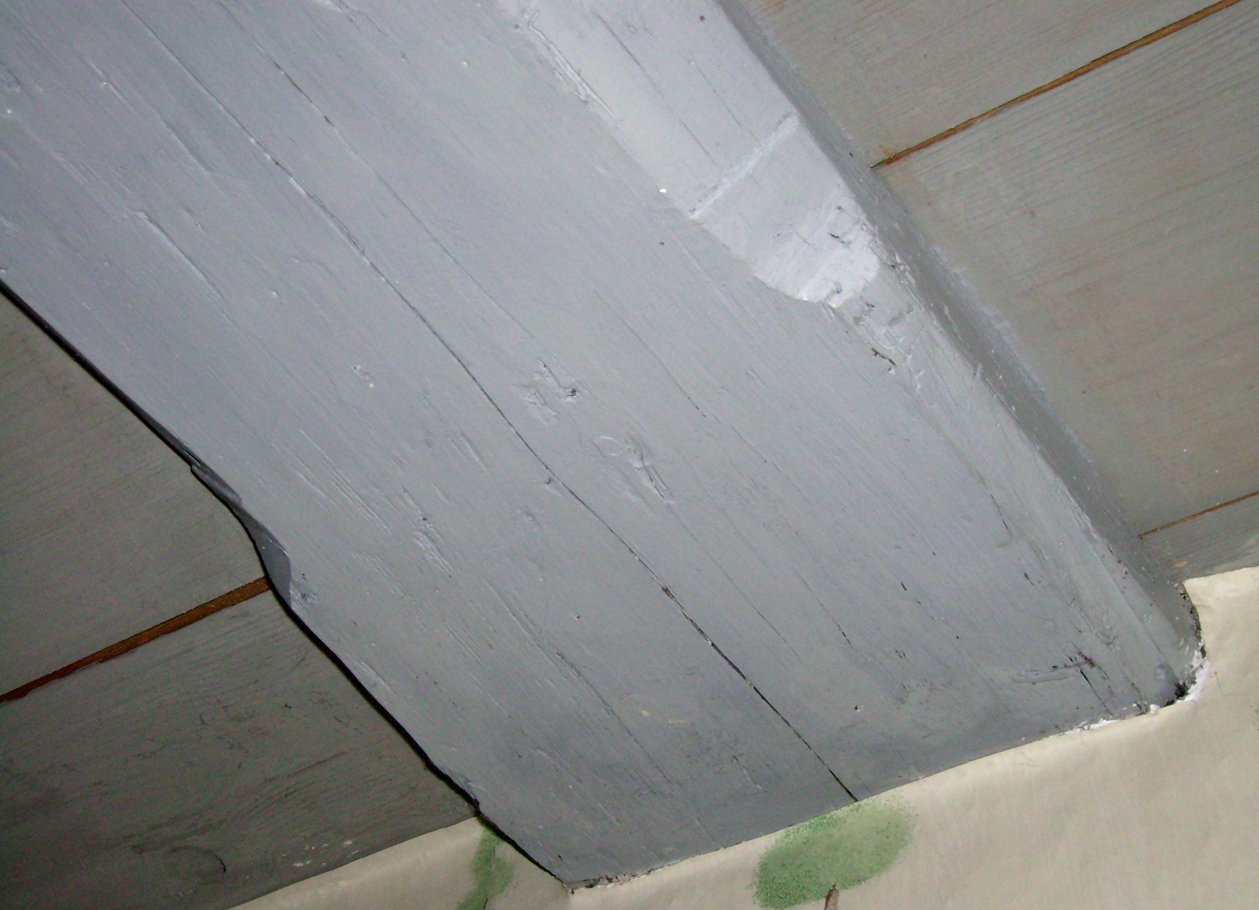 Hohlkehle an einer Balkendecke von ca. 1650